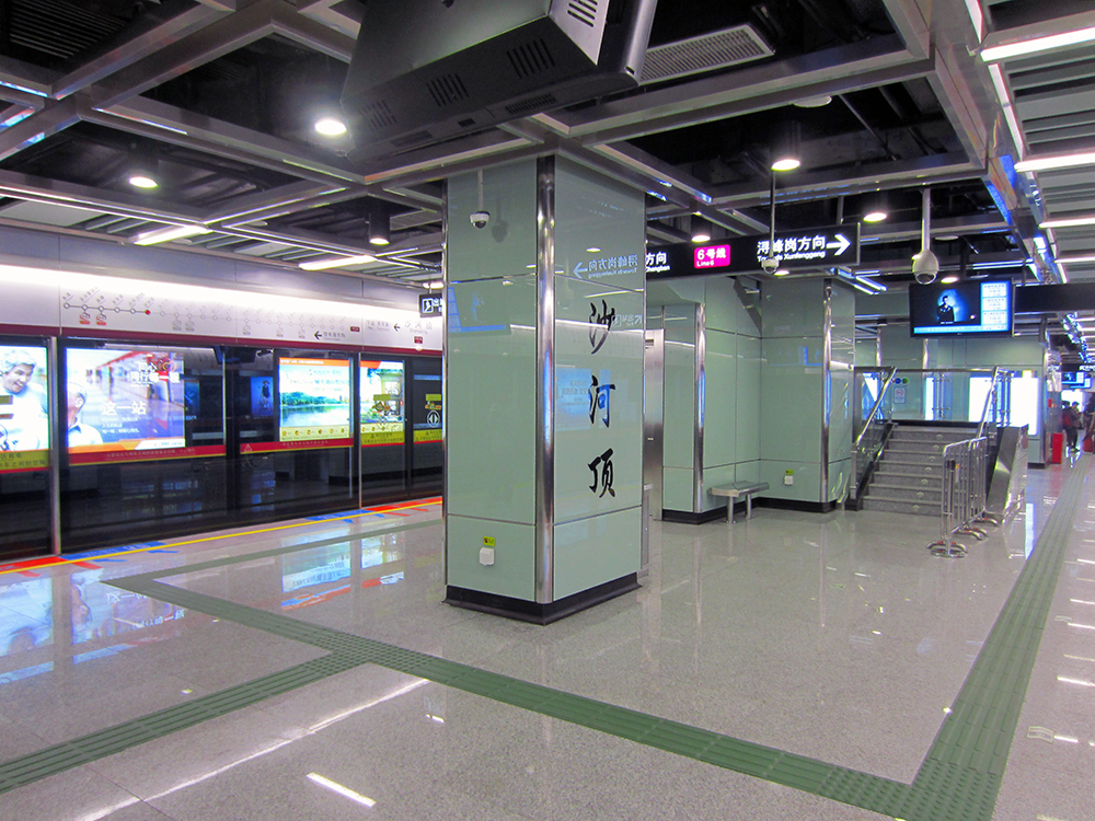 沙河頂站站台